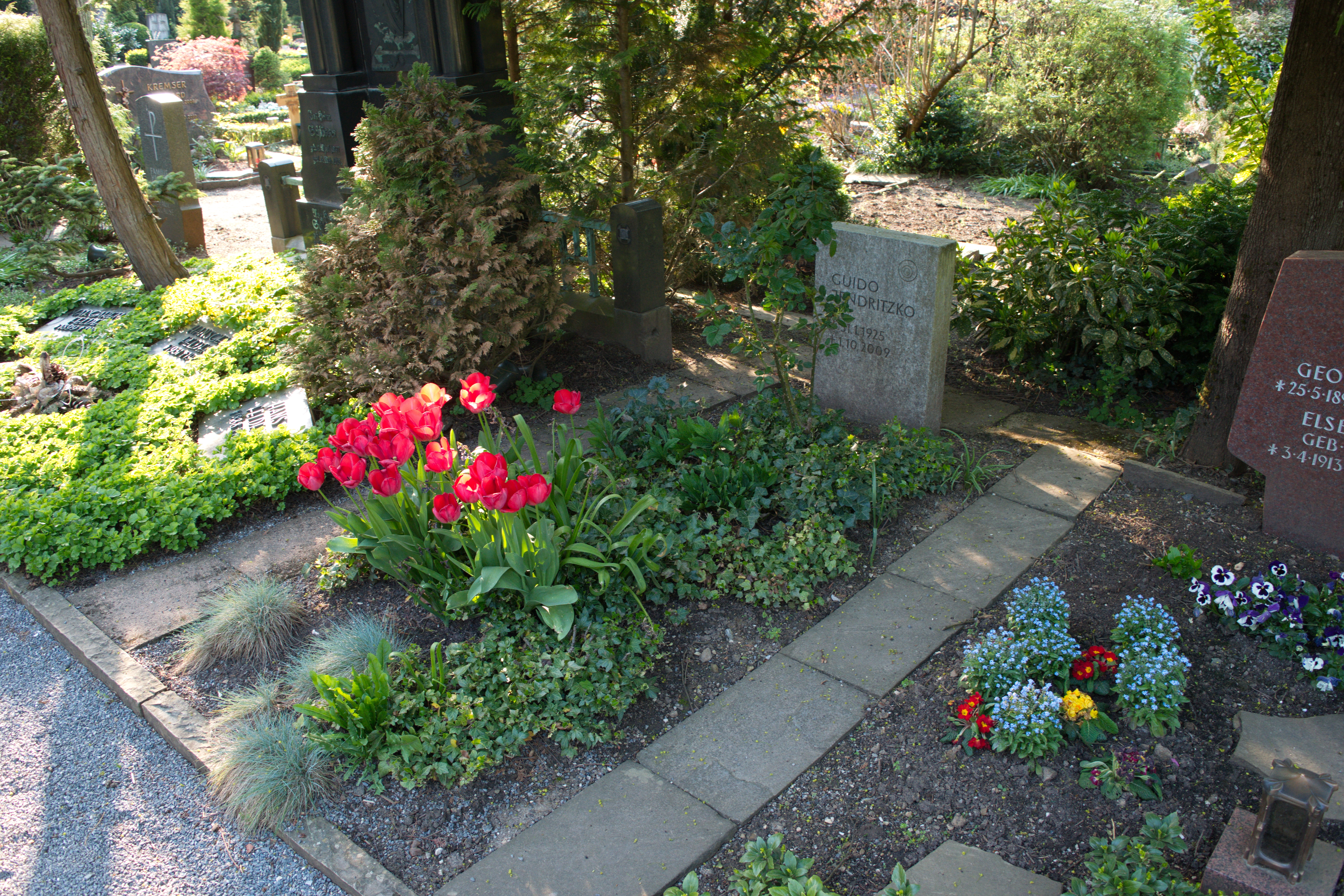 Hochstraße, Wuppertal